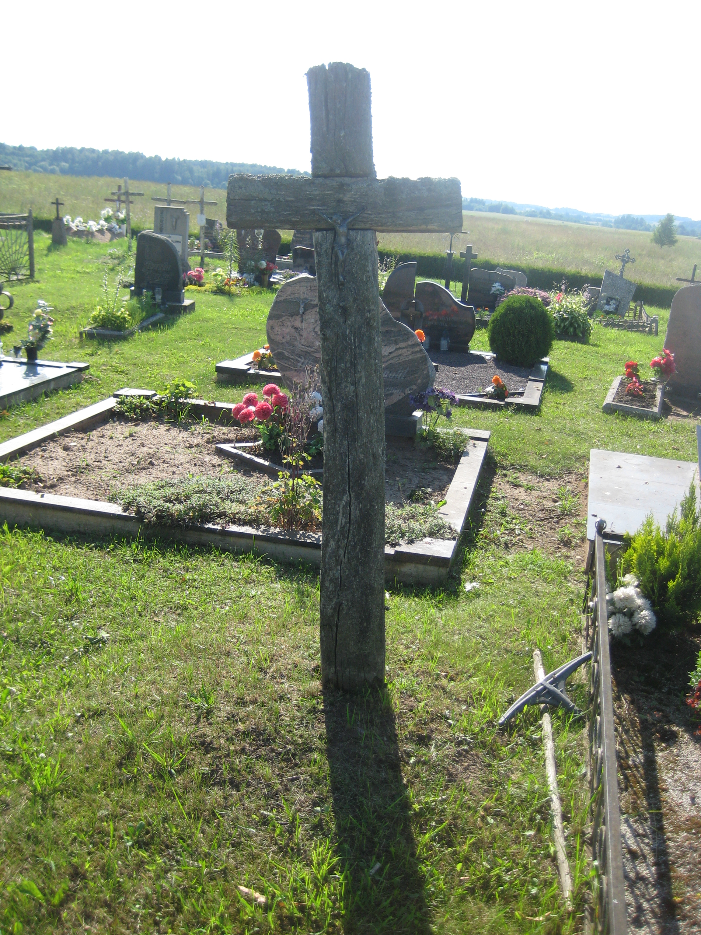 Svirkų sen., Lithuania